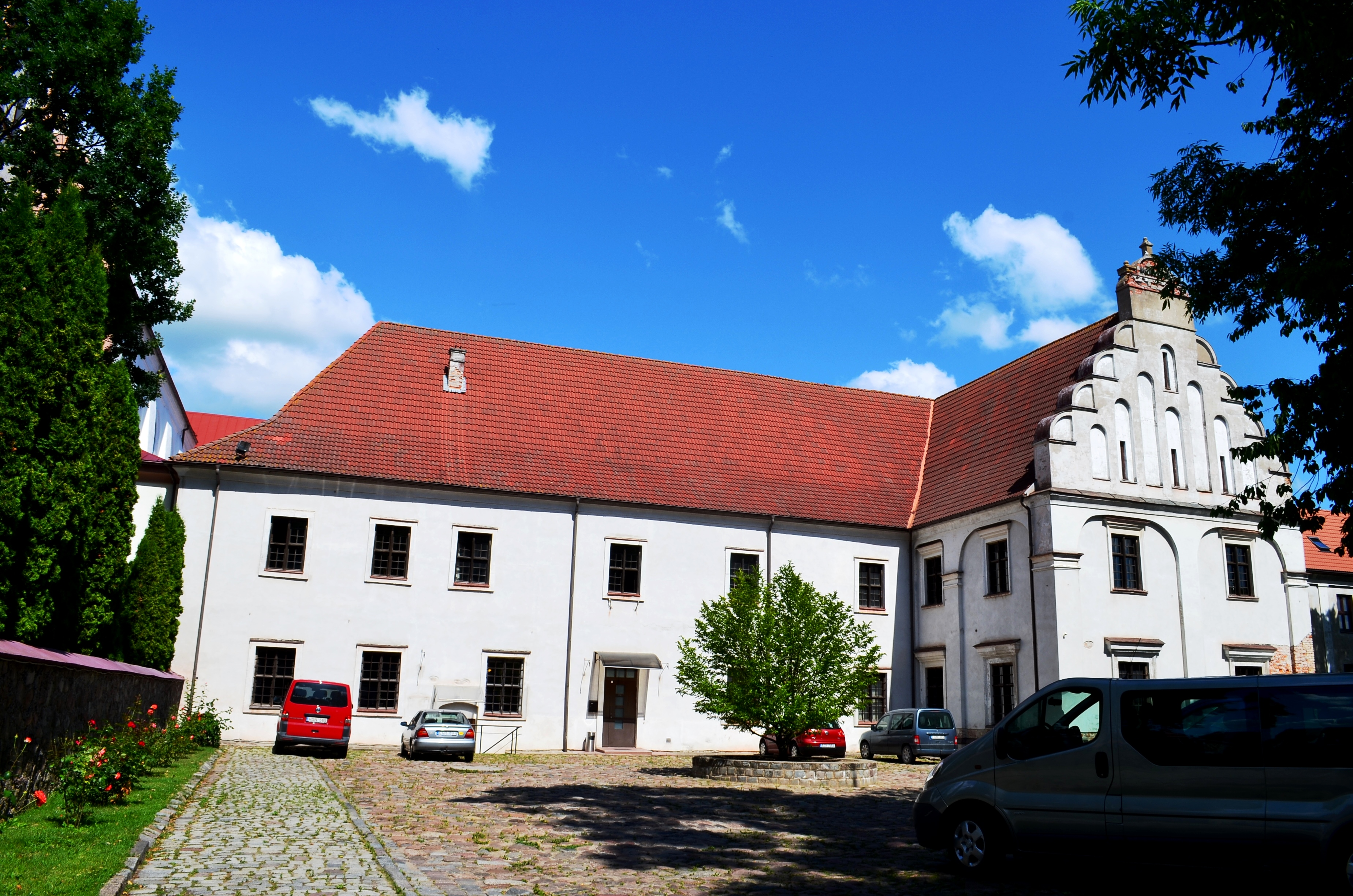 Kretingos Bernardinų vienuolynas